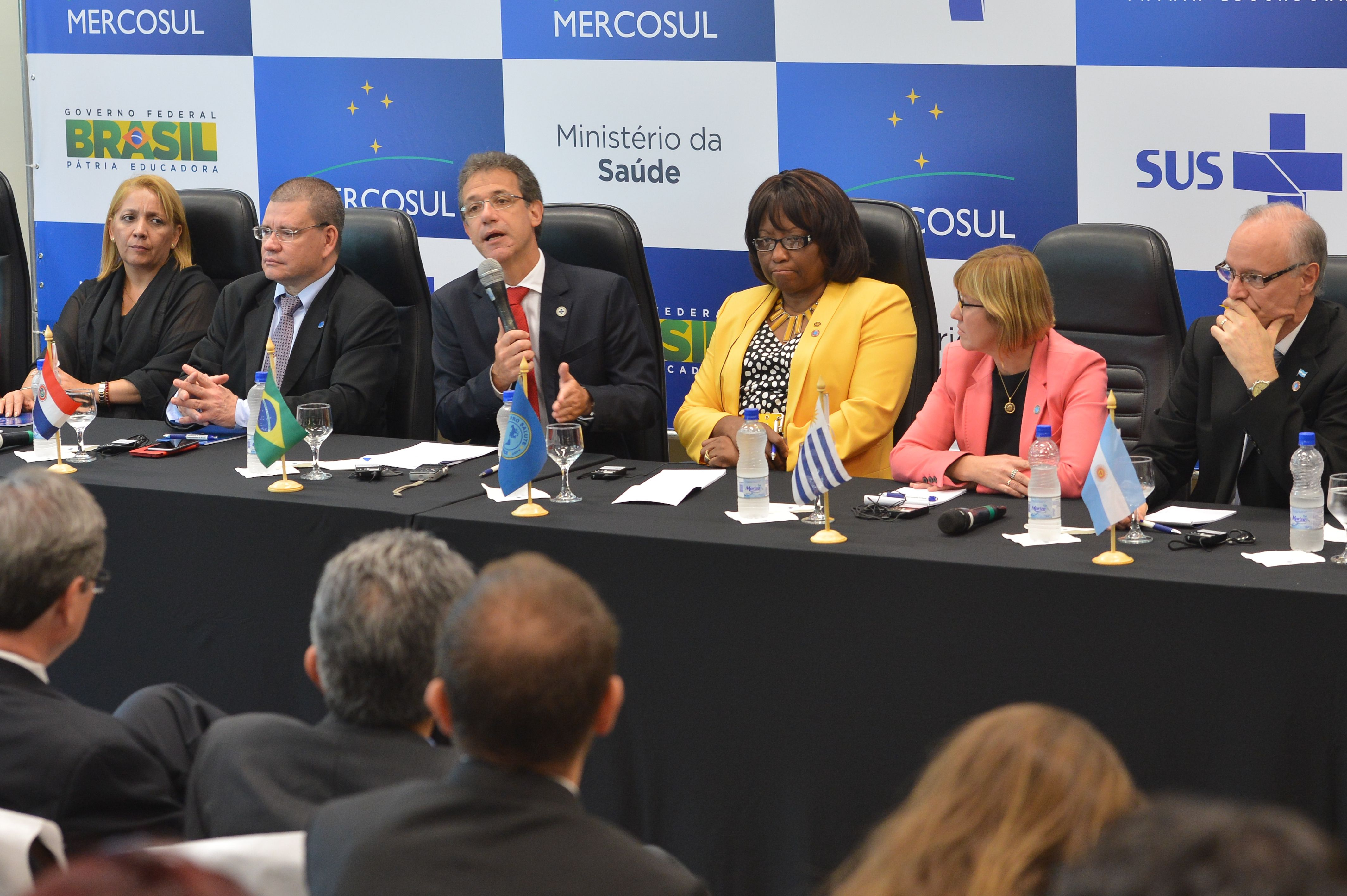 O ministro da Saúde, Arthur Chioro, ao lado da diretora da Opas, Carissa Etienne, e de ministros da Saúde de outros países do Mercosul, apresenta os compromissos firmados na área.